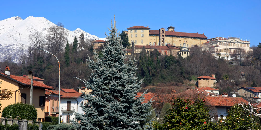 Veduta del castello di Valperga